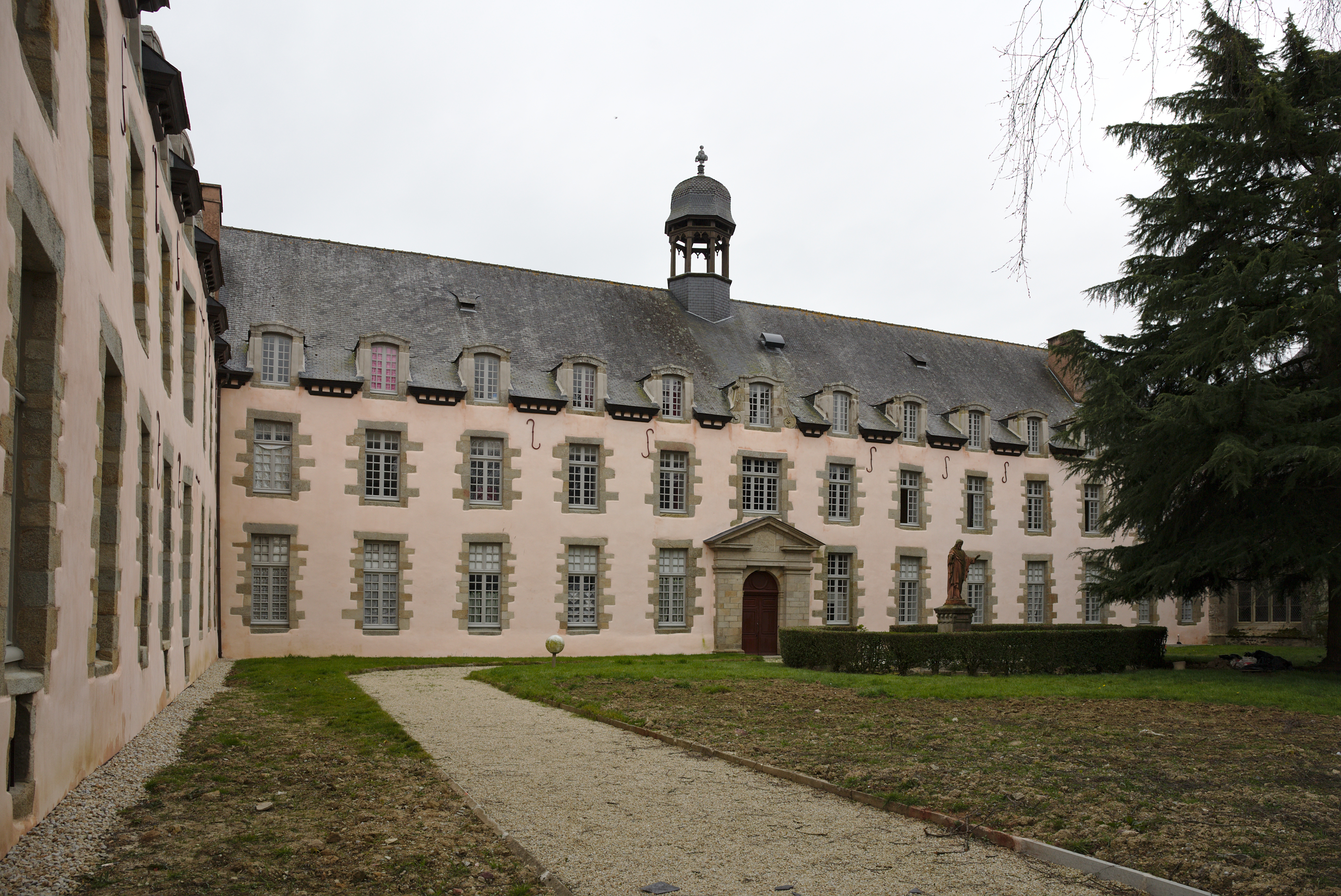 Abati Sant-Meven.